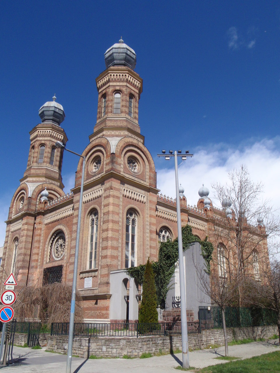 Szombathely Zsinagóga a Batthyány tér felől